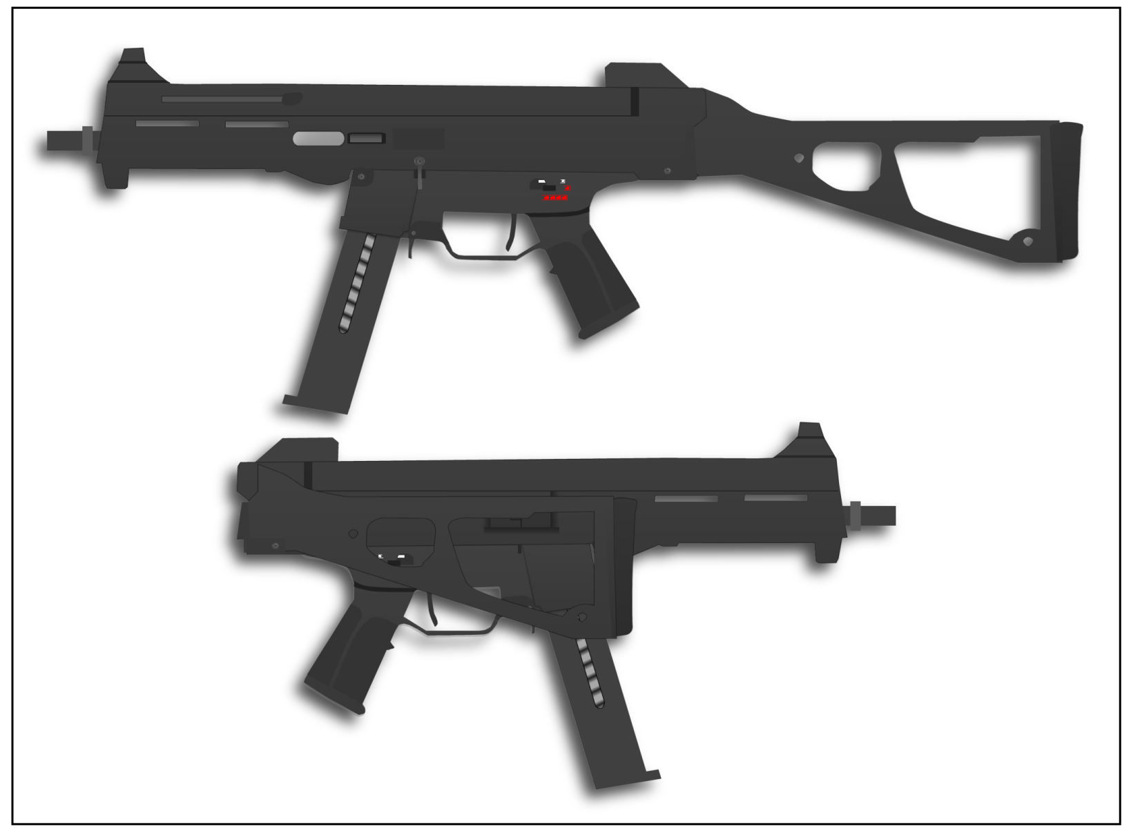 Heckler & Koch .45 caliber UMP submachine gun.